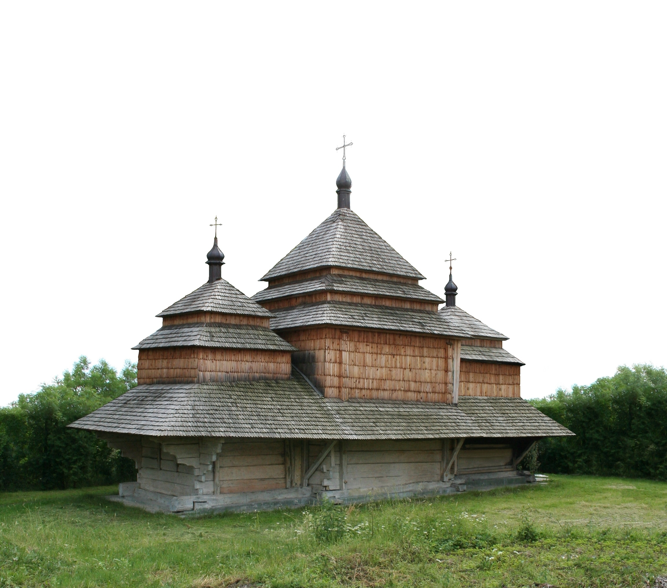 Львiвщина, Городоцький р-н, с. Кліцько